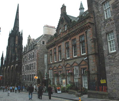 愛丁堡蘇格蘭威士忌資產中心 位於愛丁堡主教堂與愛丁堡城堡之間的愛丁堡上街(High Street)上，蘇格蘭威士忌遺產中心(Scotch Whisky Heritage Center)是一個以蘇格蘭威士忌為主題的展覽館、餐廳與專賣店之綜合機構，也是到愛丁堡一遊的觀光客經常會流連的地點之ㄧ。 本圖片由上傳者User:SElephant拍攝於2004年8月。